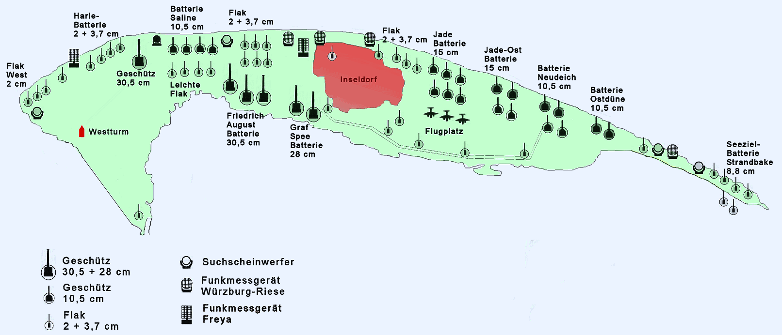 Geschützstellungen auf Wangerooge im 2. Weltkrieg Skizze gefertigt nach Vorlage von Benutzer Axel Hindemith, Mai 2006